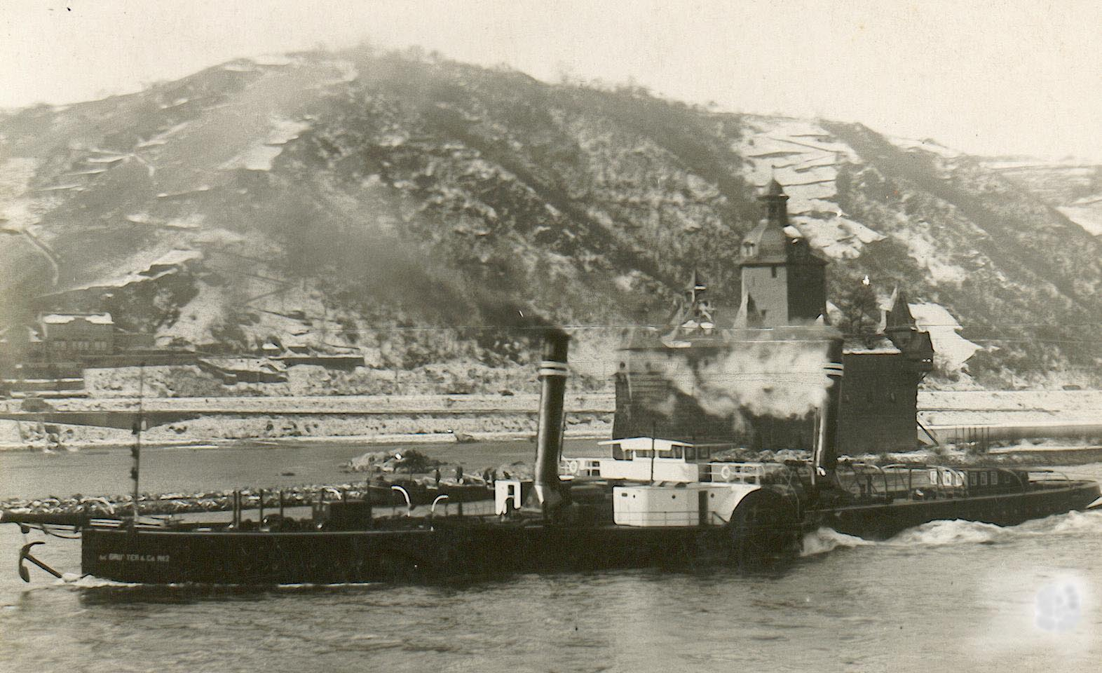 Seitenradschlepper